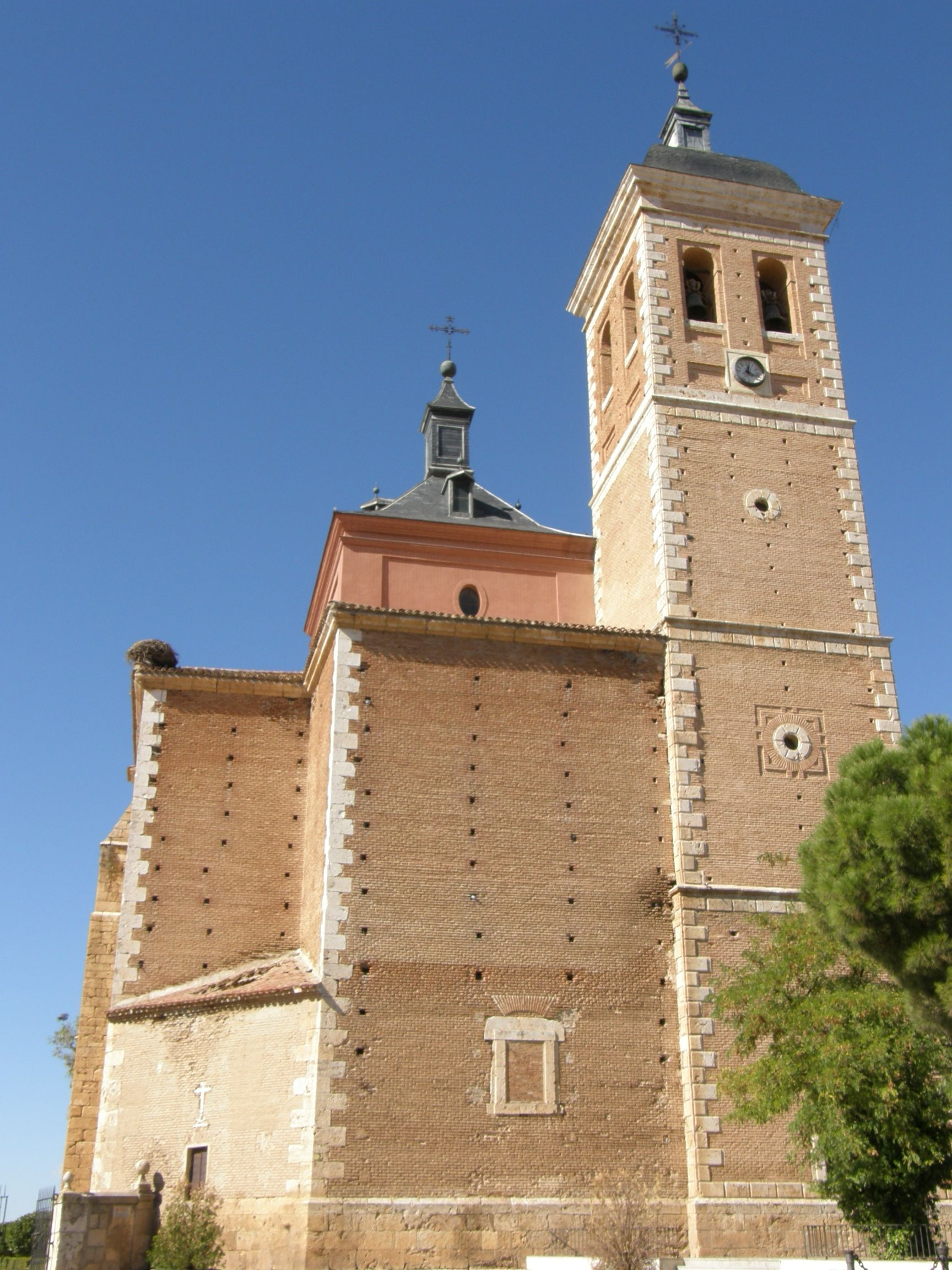 Vista exterior desde la plaza Ayuntamiento